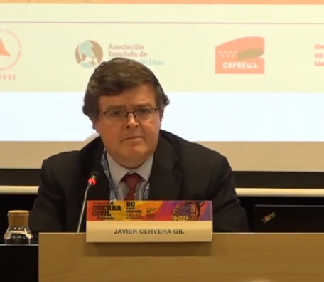 Violencia política en la Guerra Civil